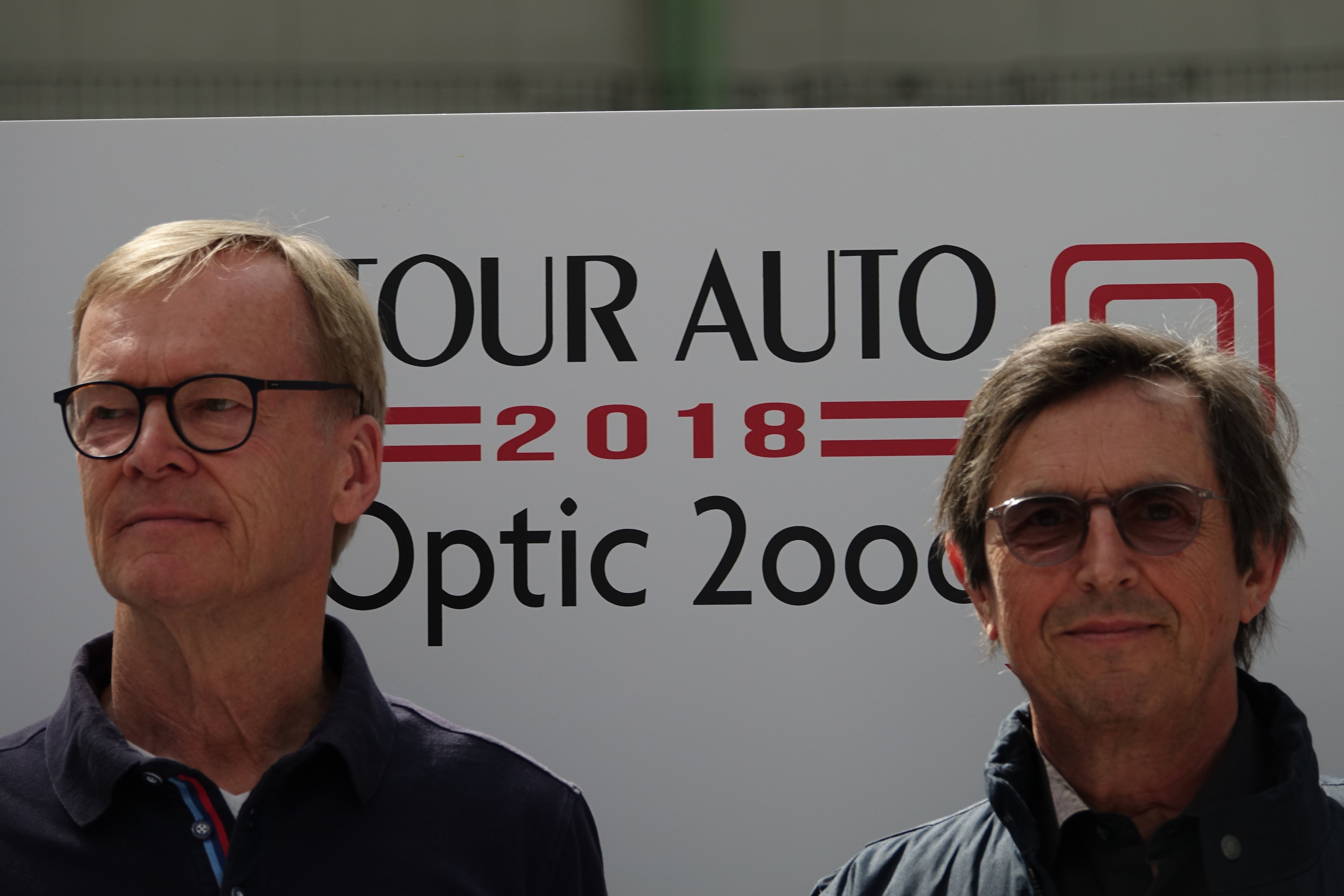 Ari Vatanen et François Chatriot au Tour Auto Optic 2000 (2018)